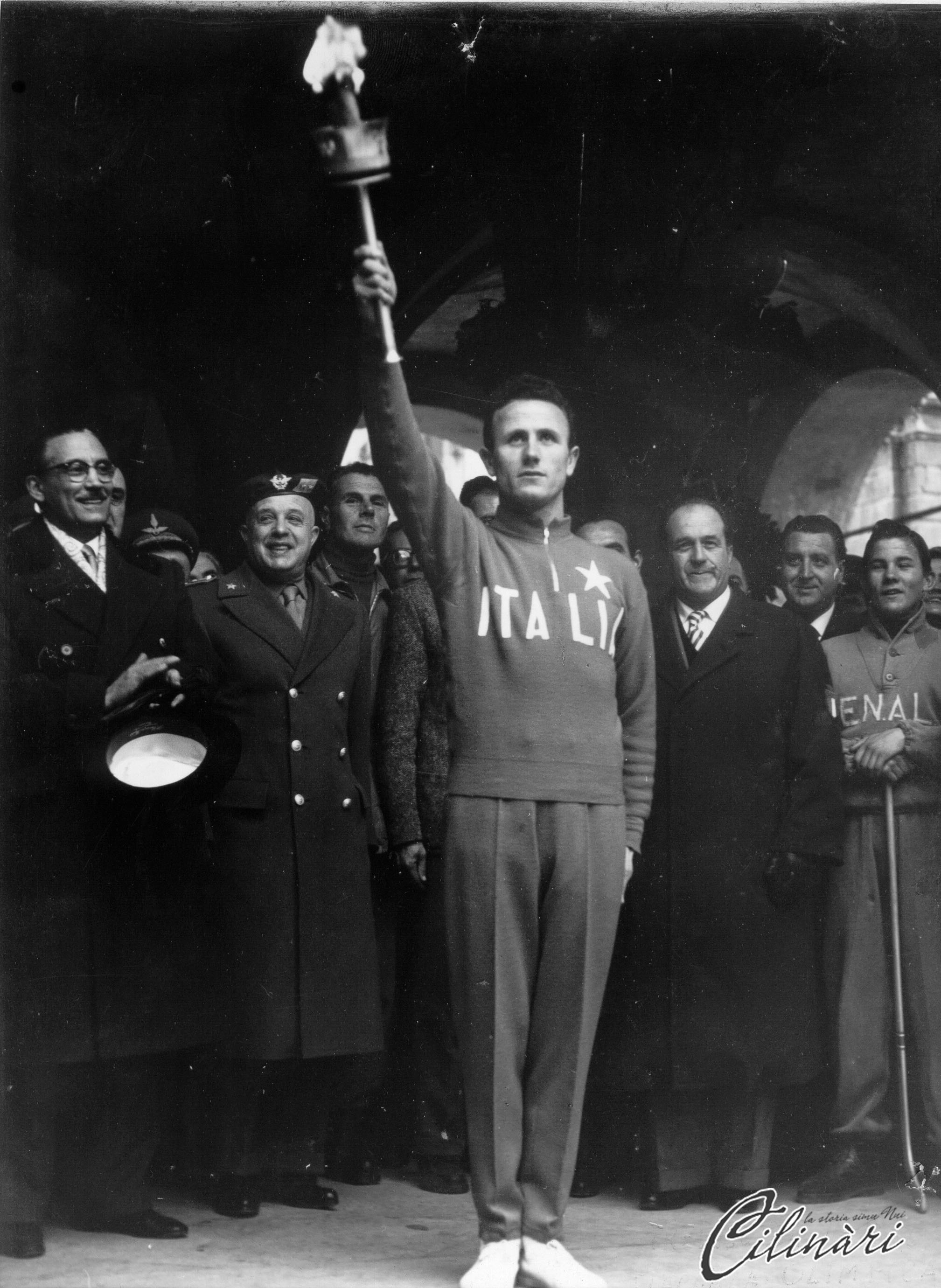 Francesco Perrone ha partecipato alla maratona delle Olimpiadi di Roma del 1960.